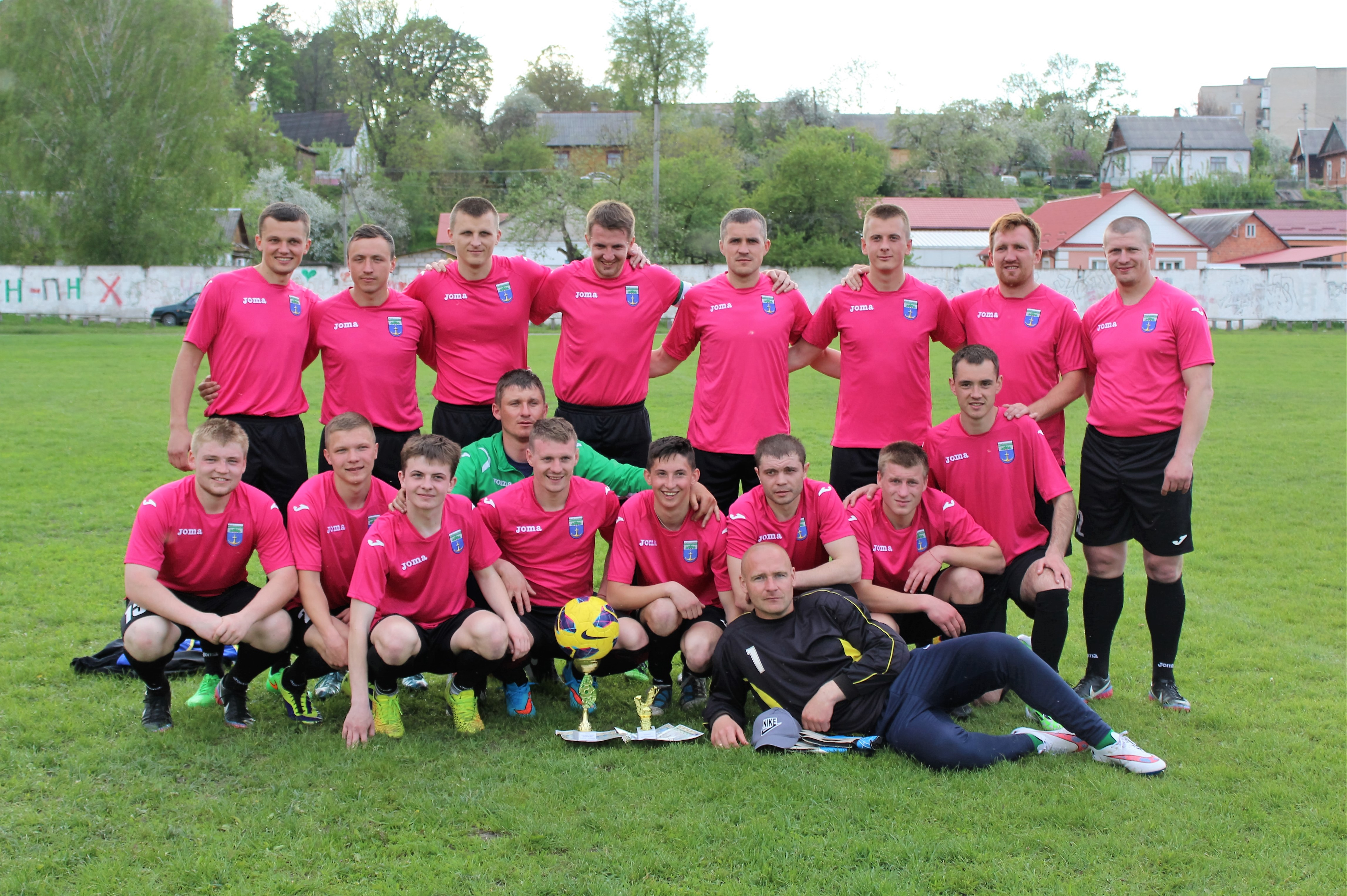 Футбольний клуб «Дубровиця»